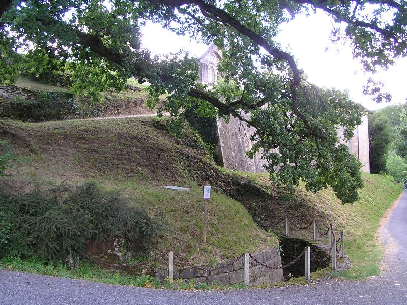 Base de la tour, château de Richemont rasé par Richard Coeur de Lion.